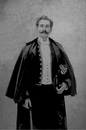 Eduardo García-Mansilla en París en 1889